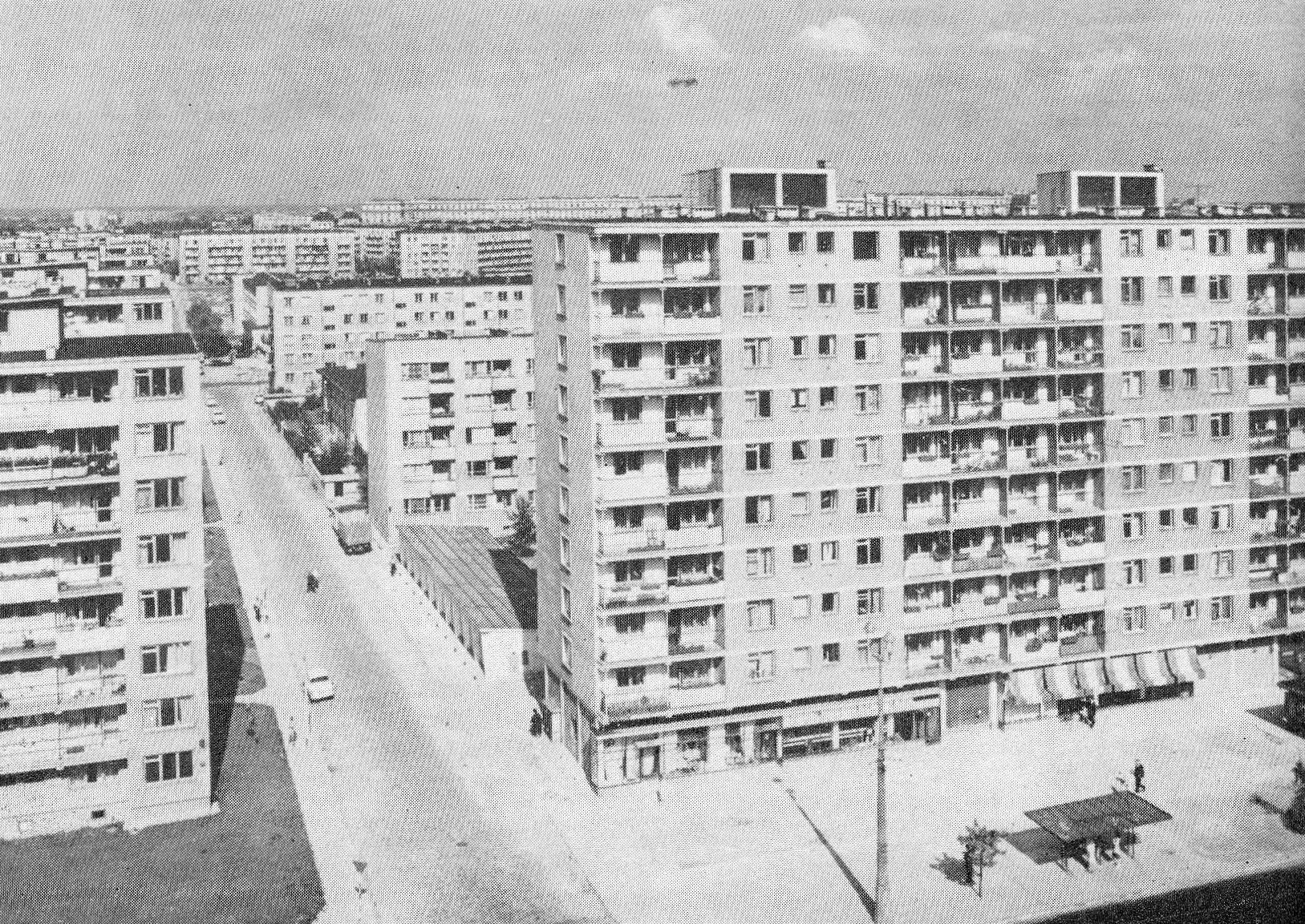 Ulica Niska widziana z ul. Marchlewskiego w latach 60 XX wieku